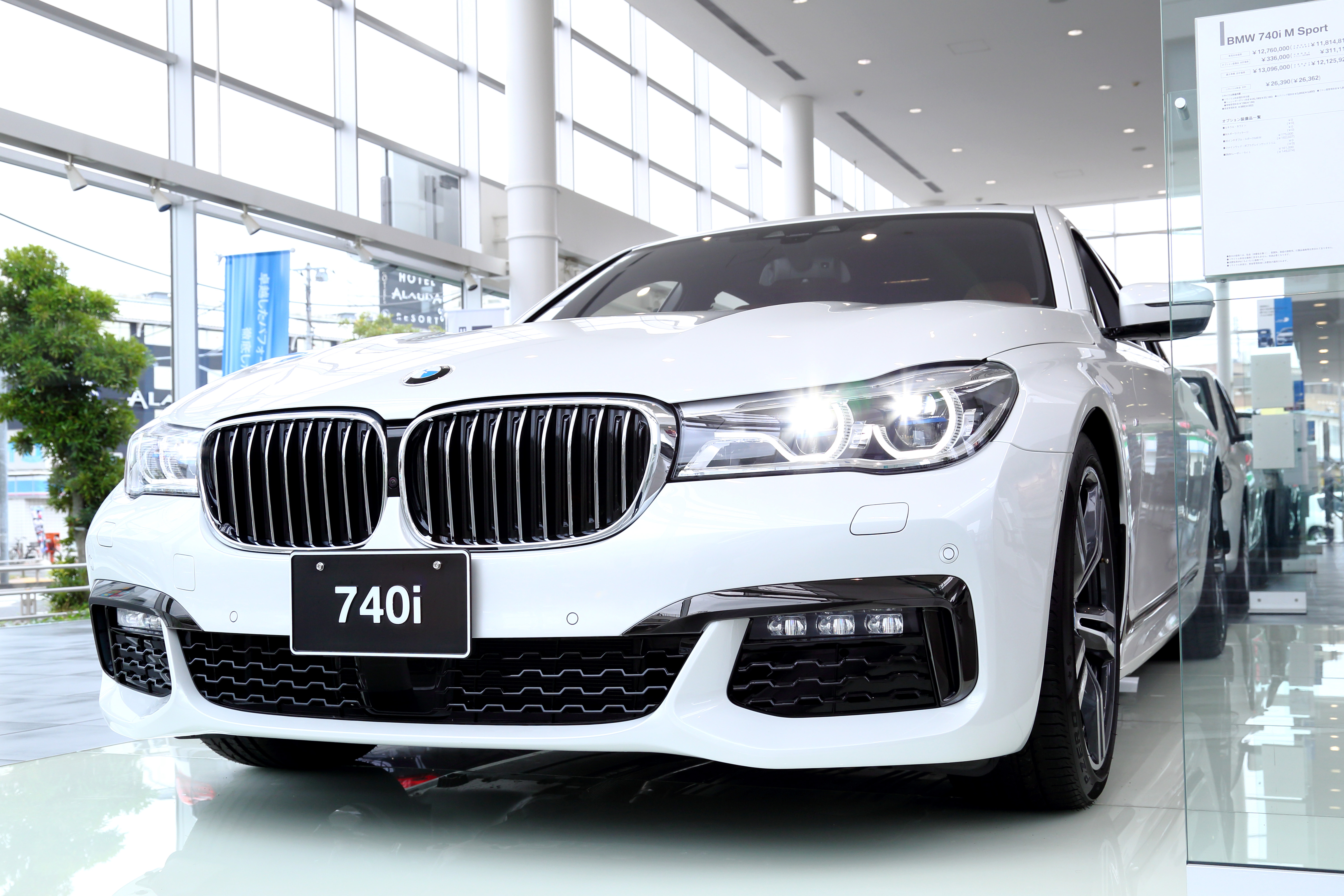 BMW・7シリーズ（G11 M Sport）を右正面から撮影した画像。